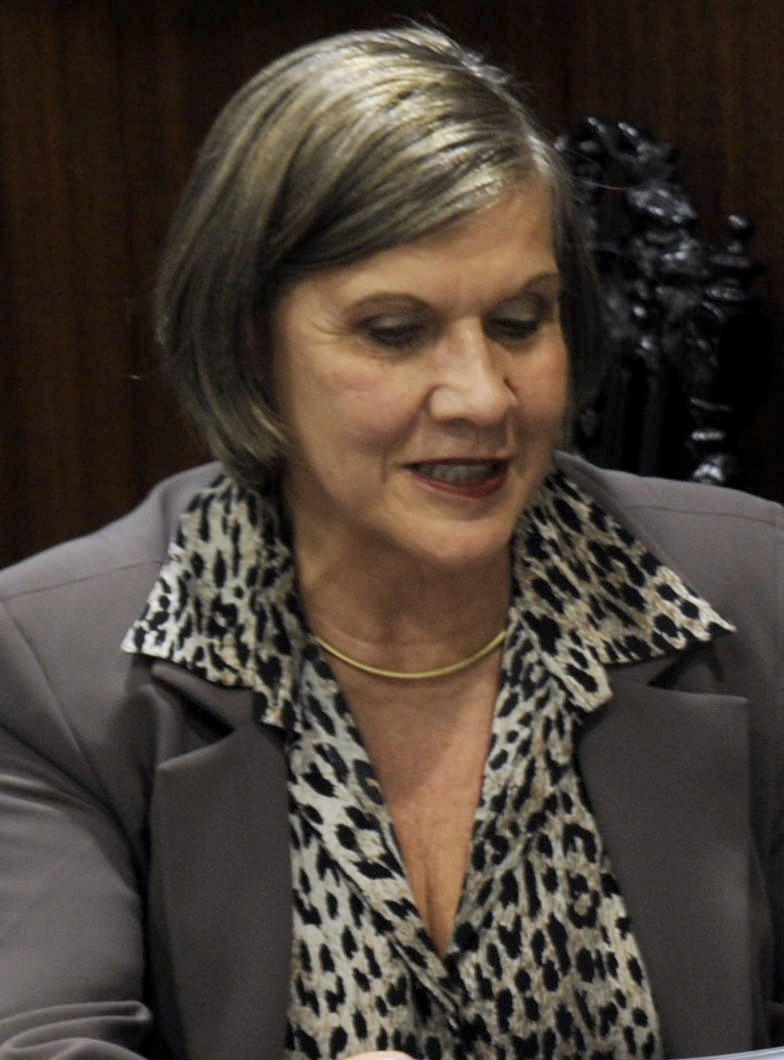 Maria Berenice Dias, desembargadora e representante da Frente Parlamentar Mista pela Cidadania LGBT no Senado Federal.